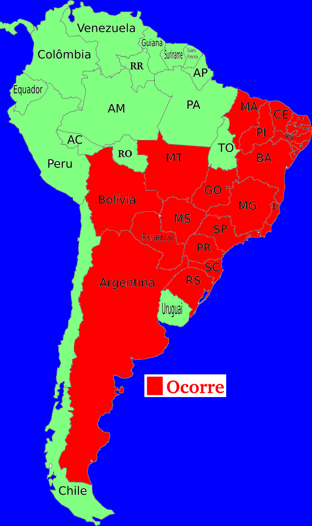 Distribuição de Vitex megapotamica